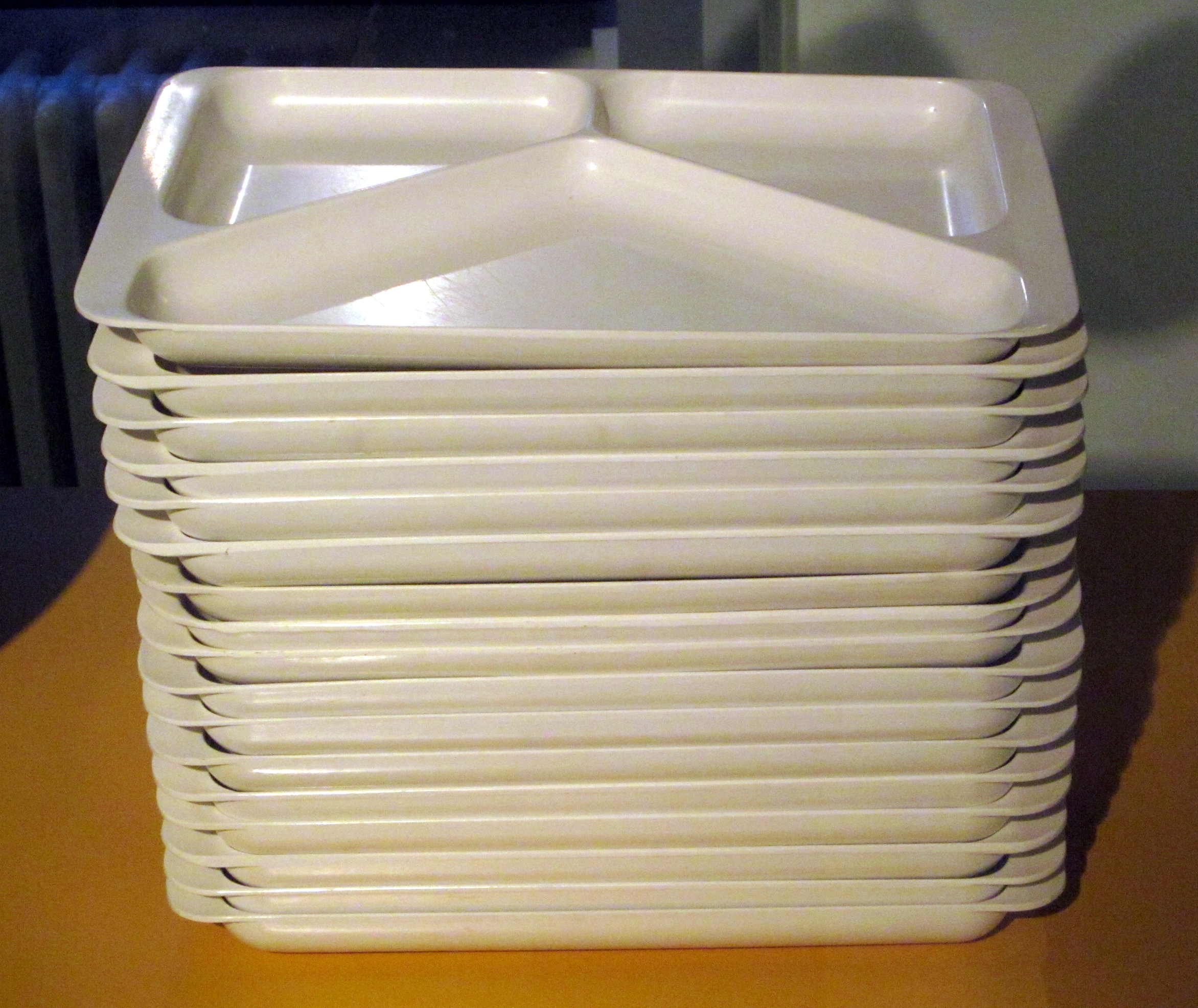 Segmentteller Geschirr Plaste Kantine DDRRiesa Nudelmuseum